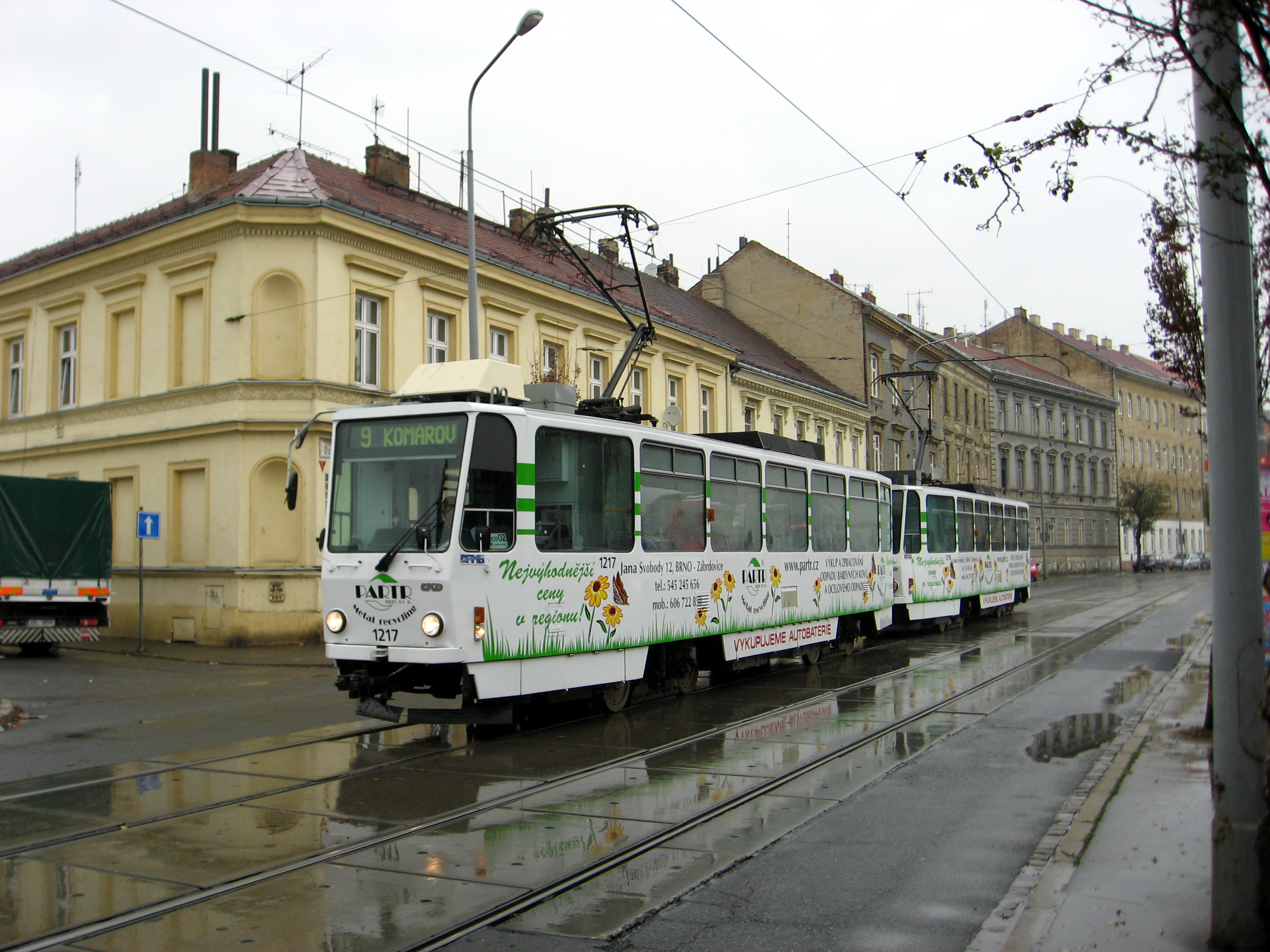 Tramvaj číslo 1217 na Dornychu